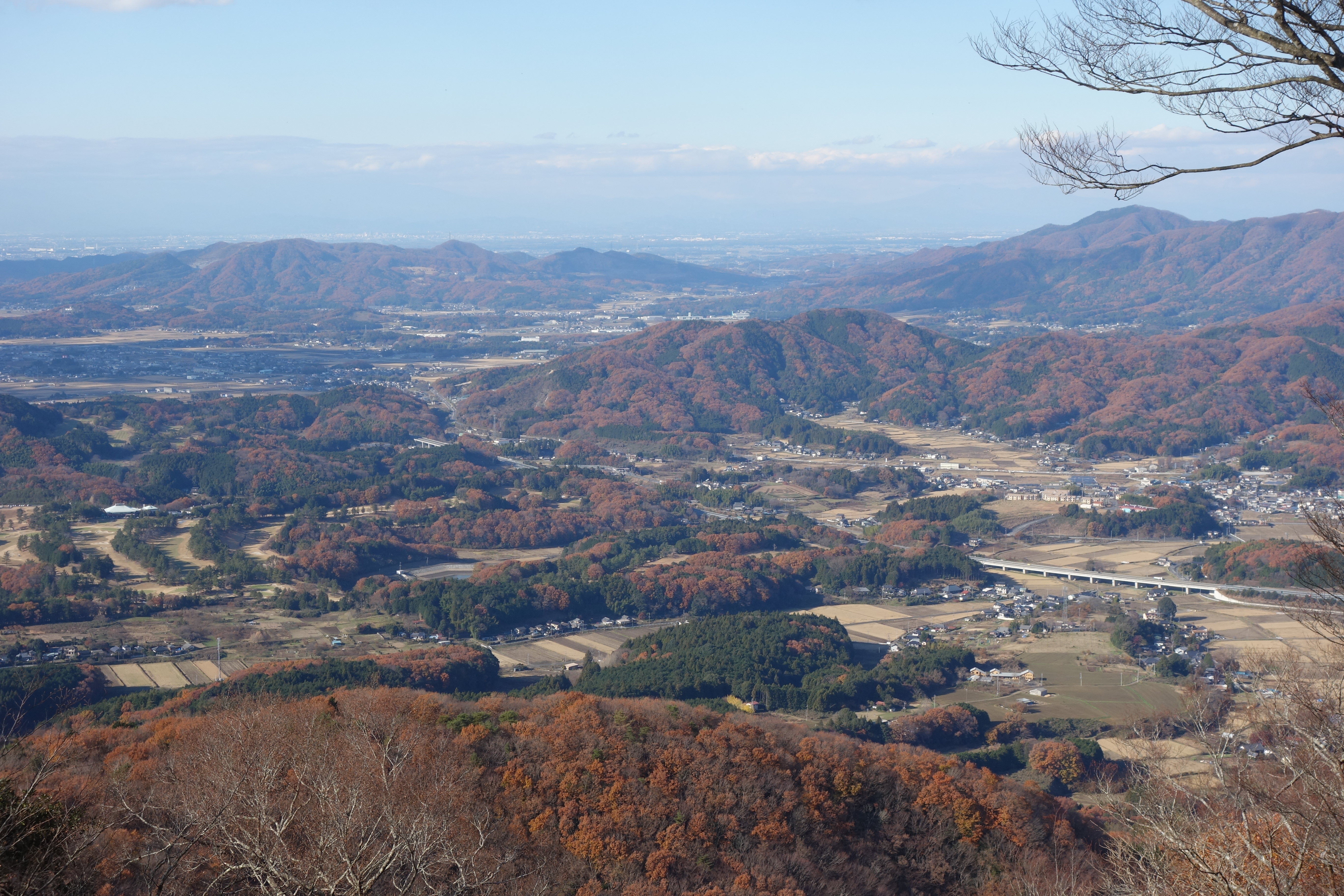 吾国山山頂から北面の眺め